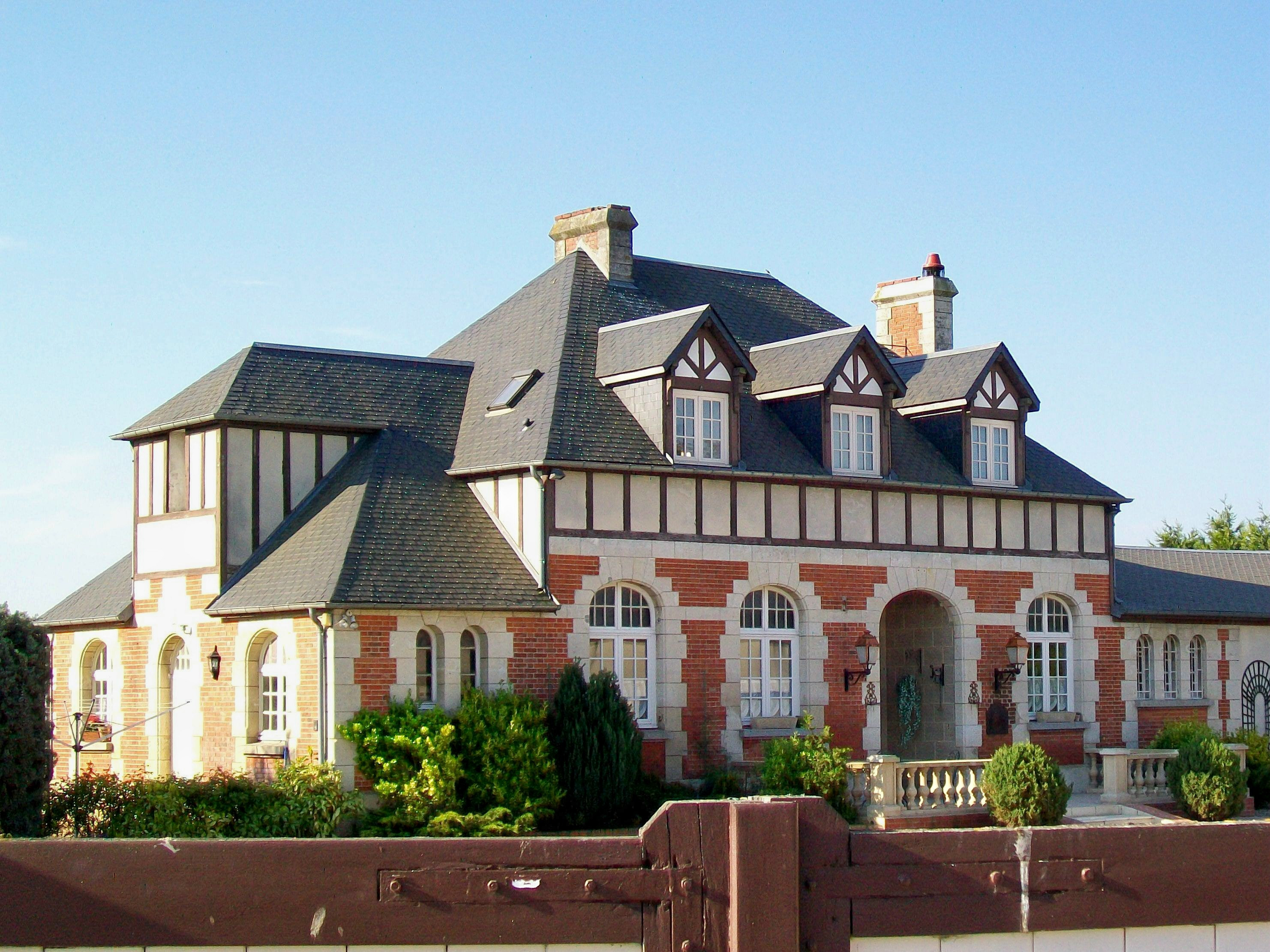 L'ancien bâtiment voyageurs de la gare de Barbery, située à mi-chemin entre Barbery et Montépilloy, mais sur la commune de Borest. Ce bâtiment a été construit en même temps que celui de Senlis, également détruit au début de la première guerre mondiale, et son style est le même, car tous les deux ont été dessinés par le même architecte, Gustave Umbdenstock.